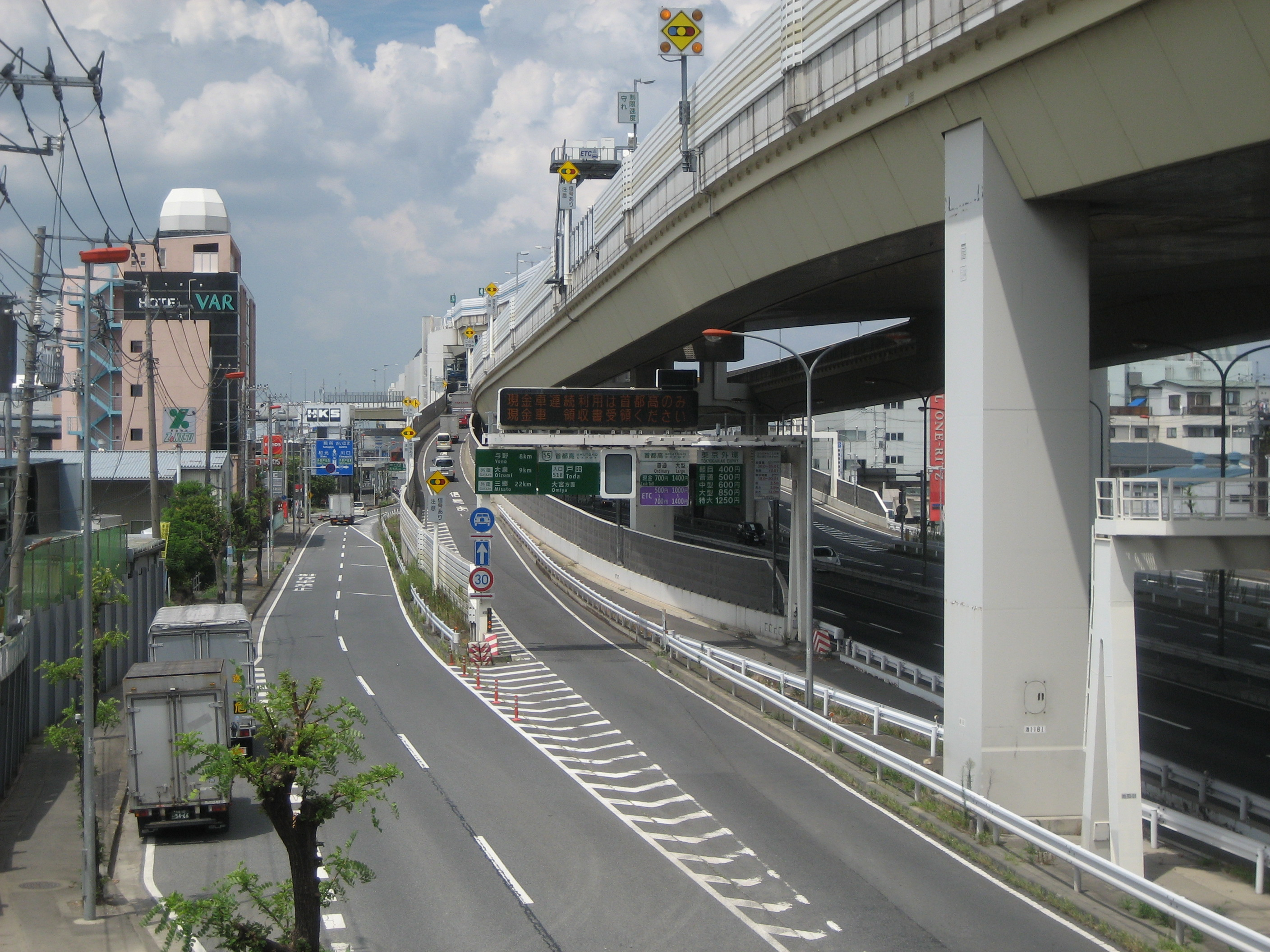 首都高速5号池袋線戸田入口付近